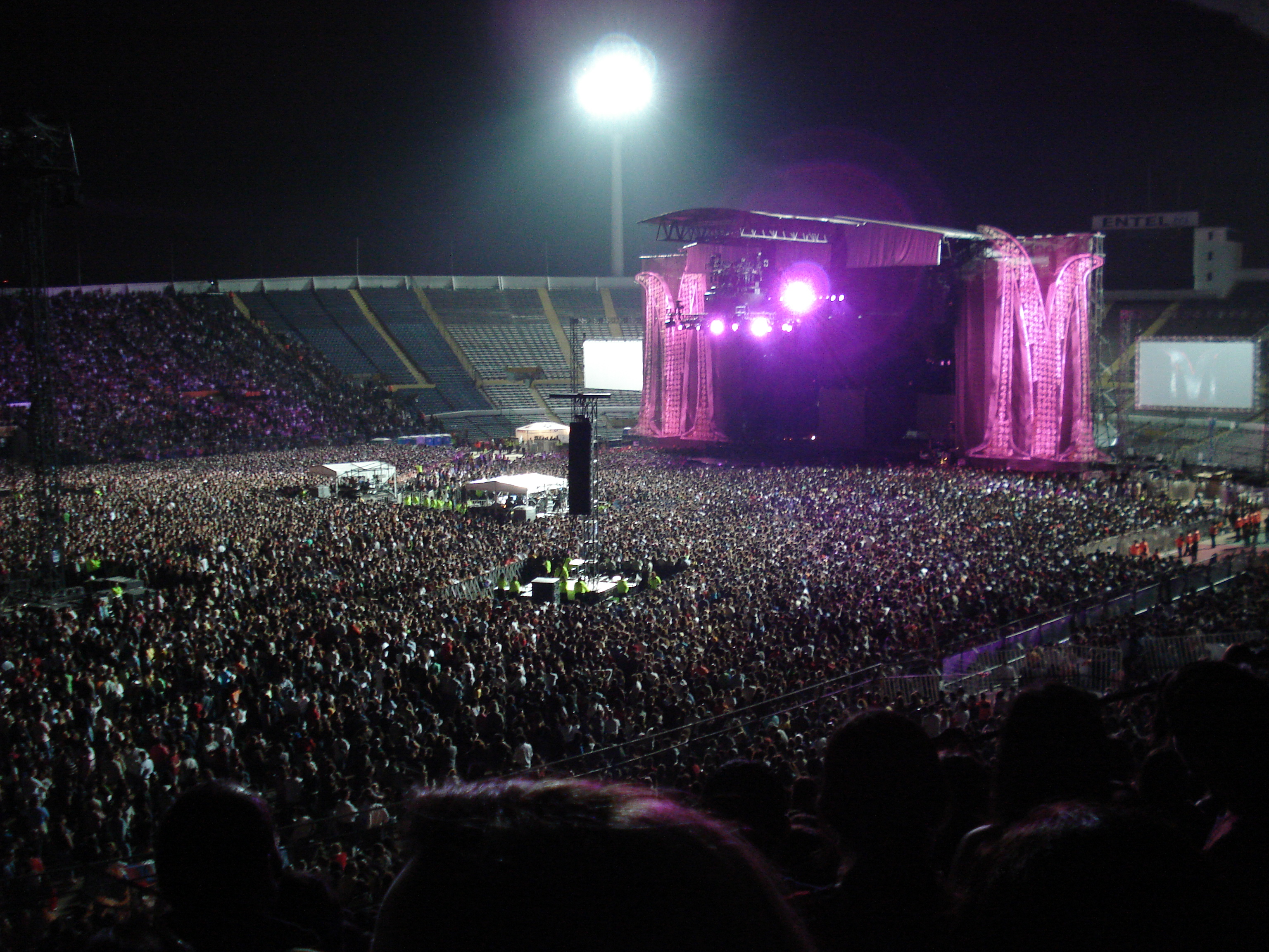 Víspera del Segundo Concierto de Madonna en Chile, 11 de Diciembre de 2008 ante más de 70000 personas, en su paso por Santiago fue el mítico Estadio Nacional de Chile quien cobijó a más de 140000 fanáticos de la cantante en su gira Sticky & Sweet Tour 2008